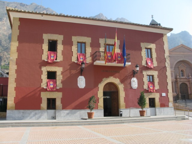 Palacio de la Orden de Predicadores en Redován (España)